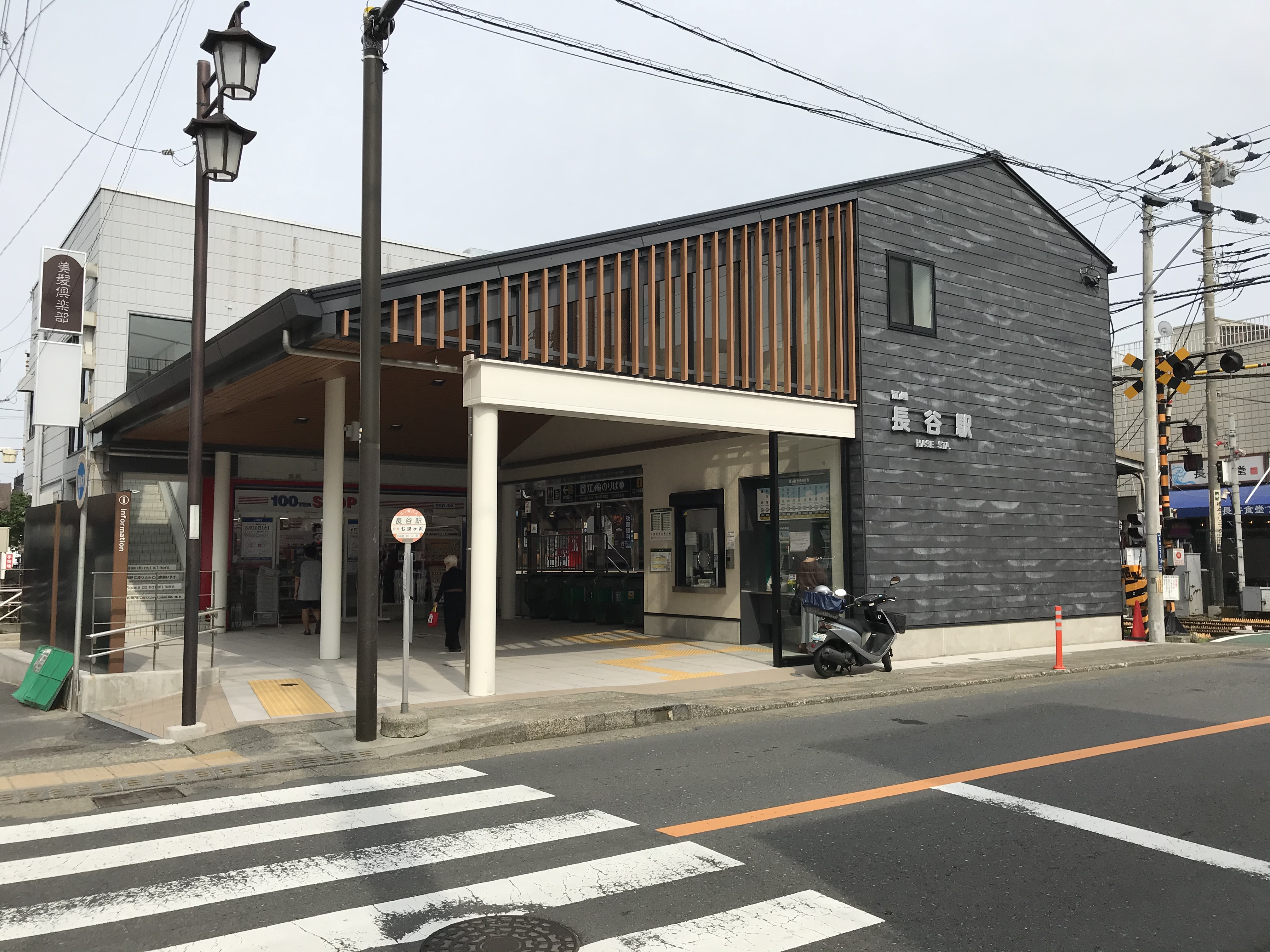 江ノ電長谷駅新駅舎